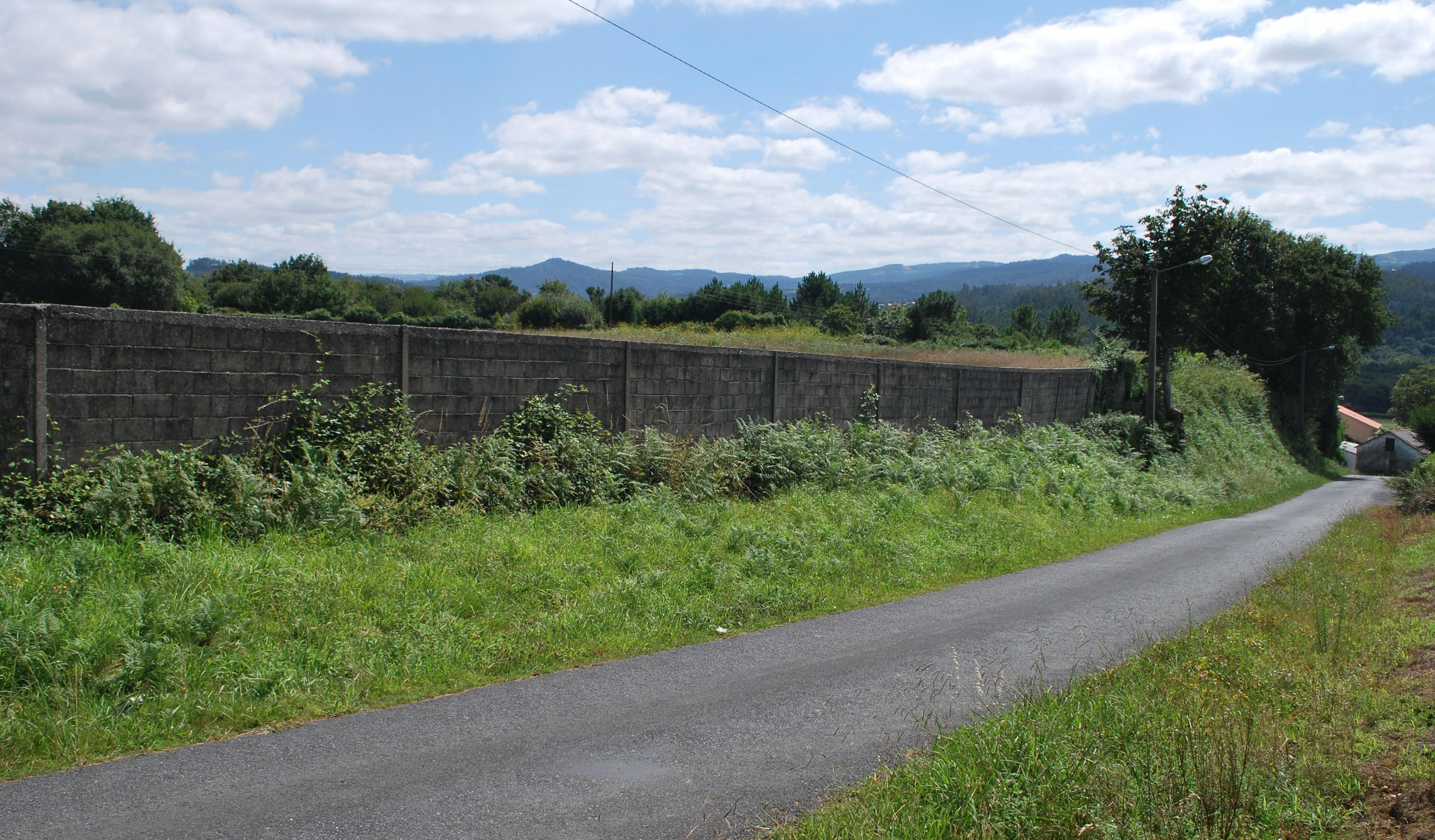 Vista do castro da Ermida en Pedroso Narón